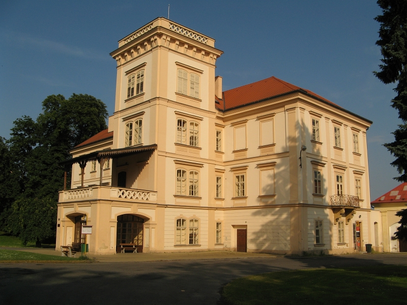 Zámek Slabce, Slabce 28